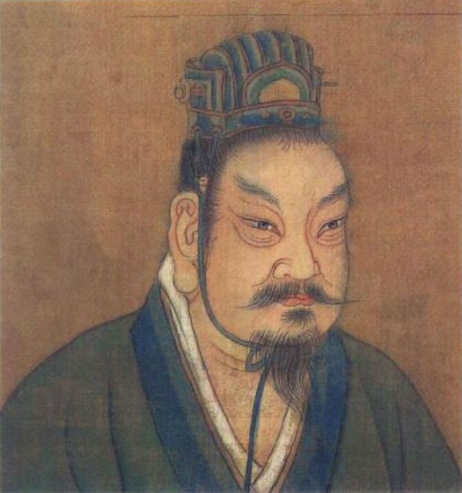 周成王像，清人绘